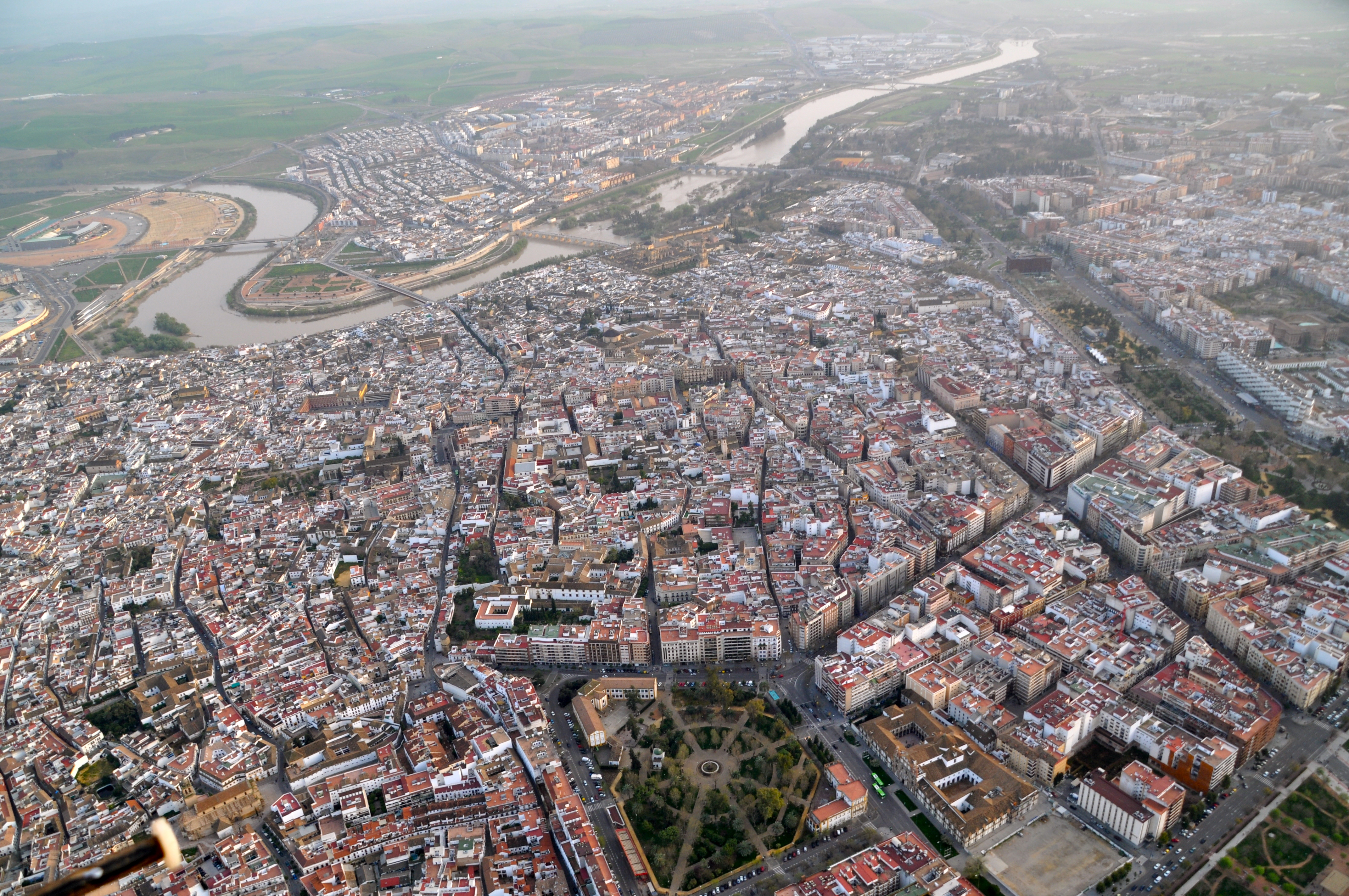 Vista aérea de Córdoba (España).